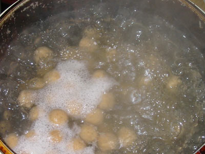 Die Boilies werden zum Beispiel in der Friteuse gekocht, bis sie an die Oberfläche steigen (3-5 Min).